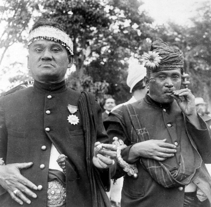 Repronegatief. De Radja van Siantar en de Radja van Dolog Silou